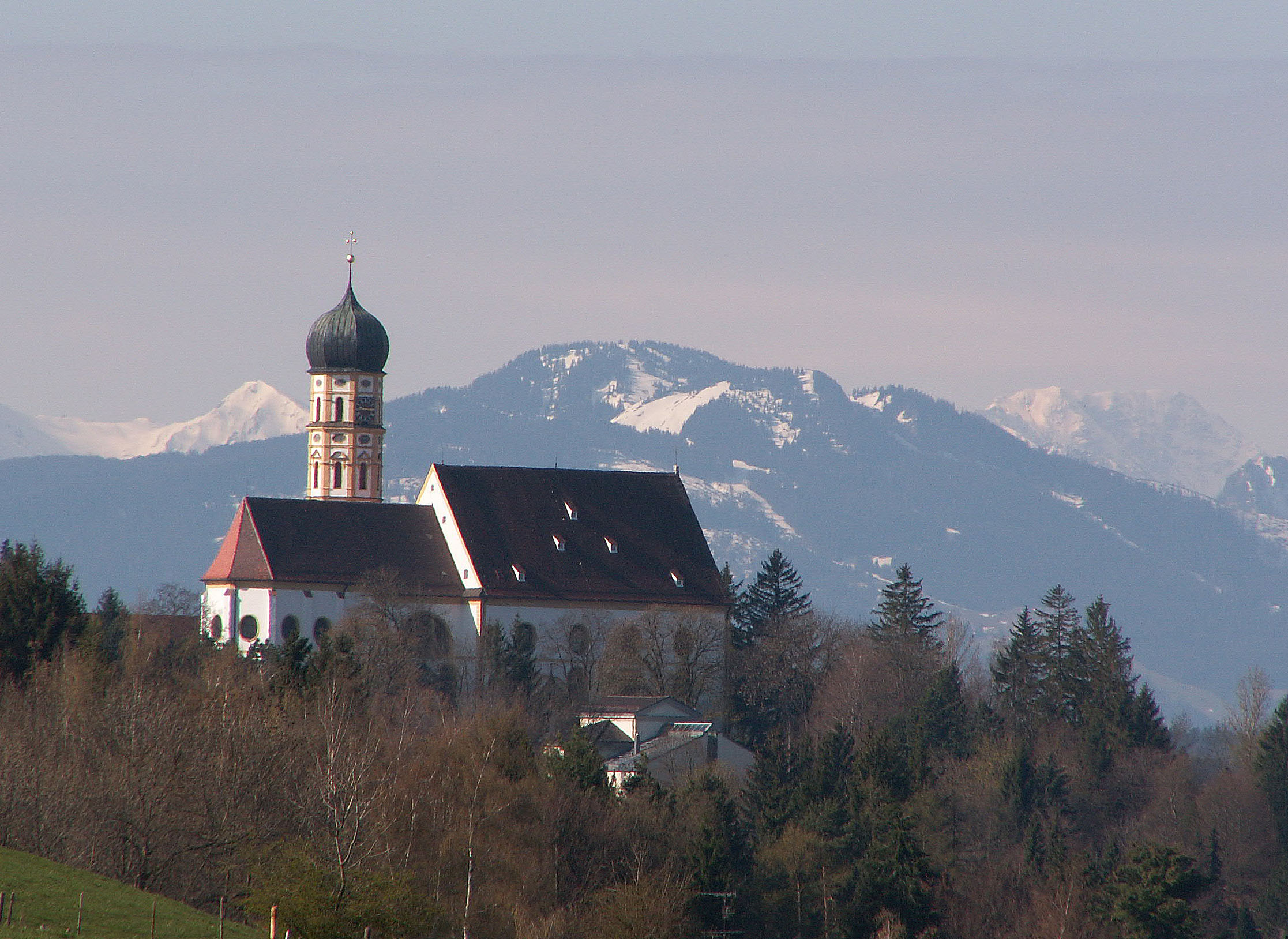 Pfarrkirche St. Martin in Marktoberdorf